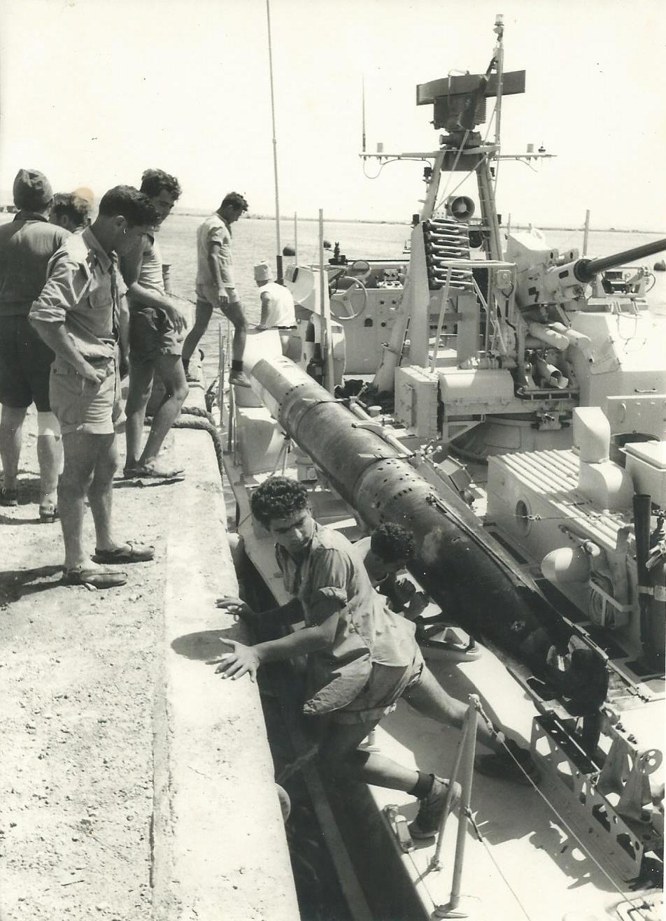 טורפדו אימונים בטרפדת ברציף אילת.